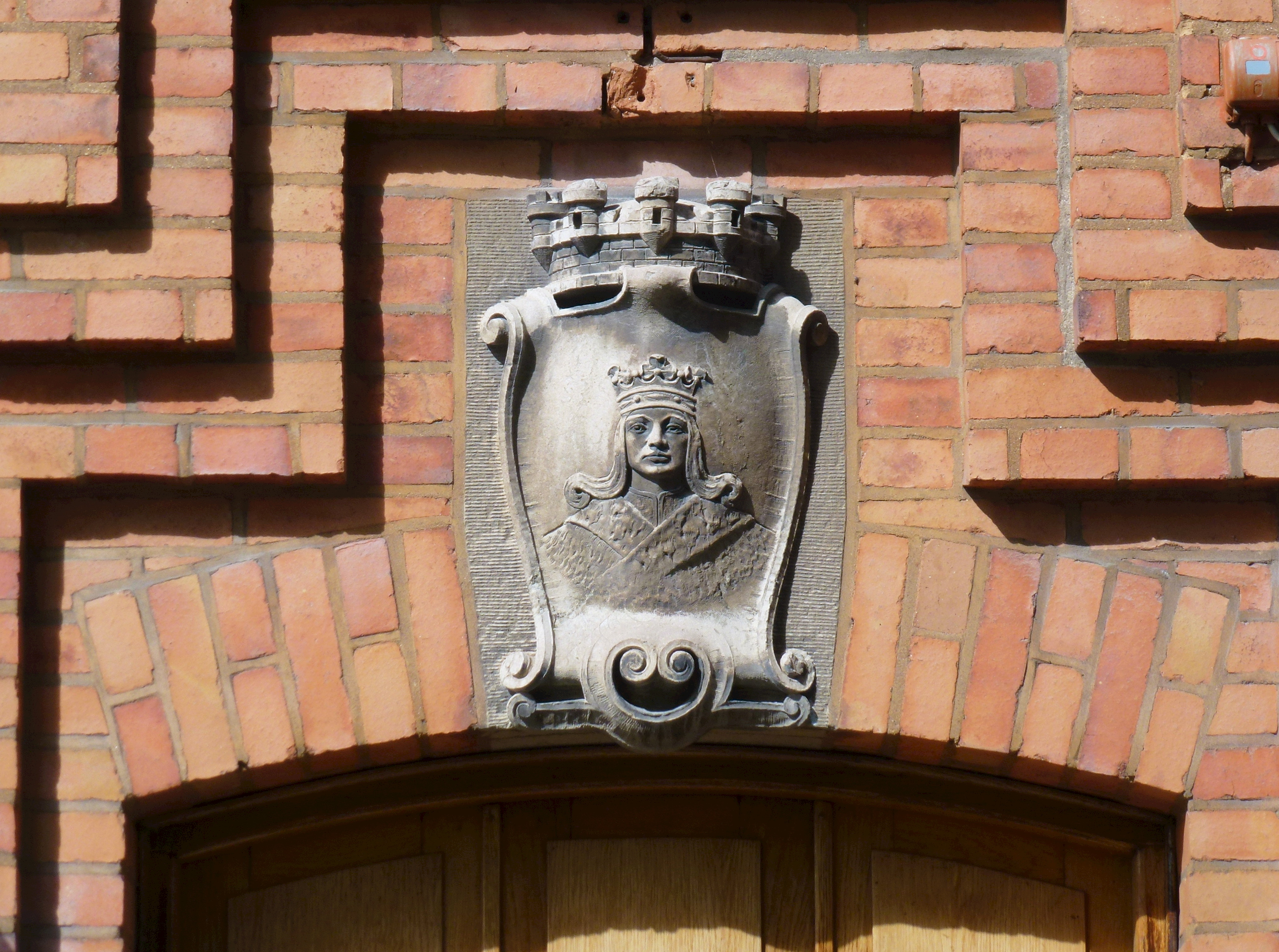 Enskedestationen